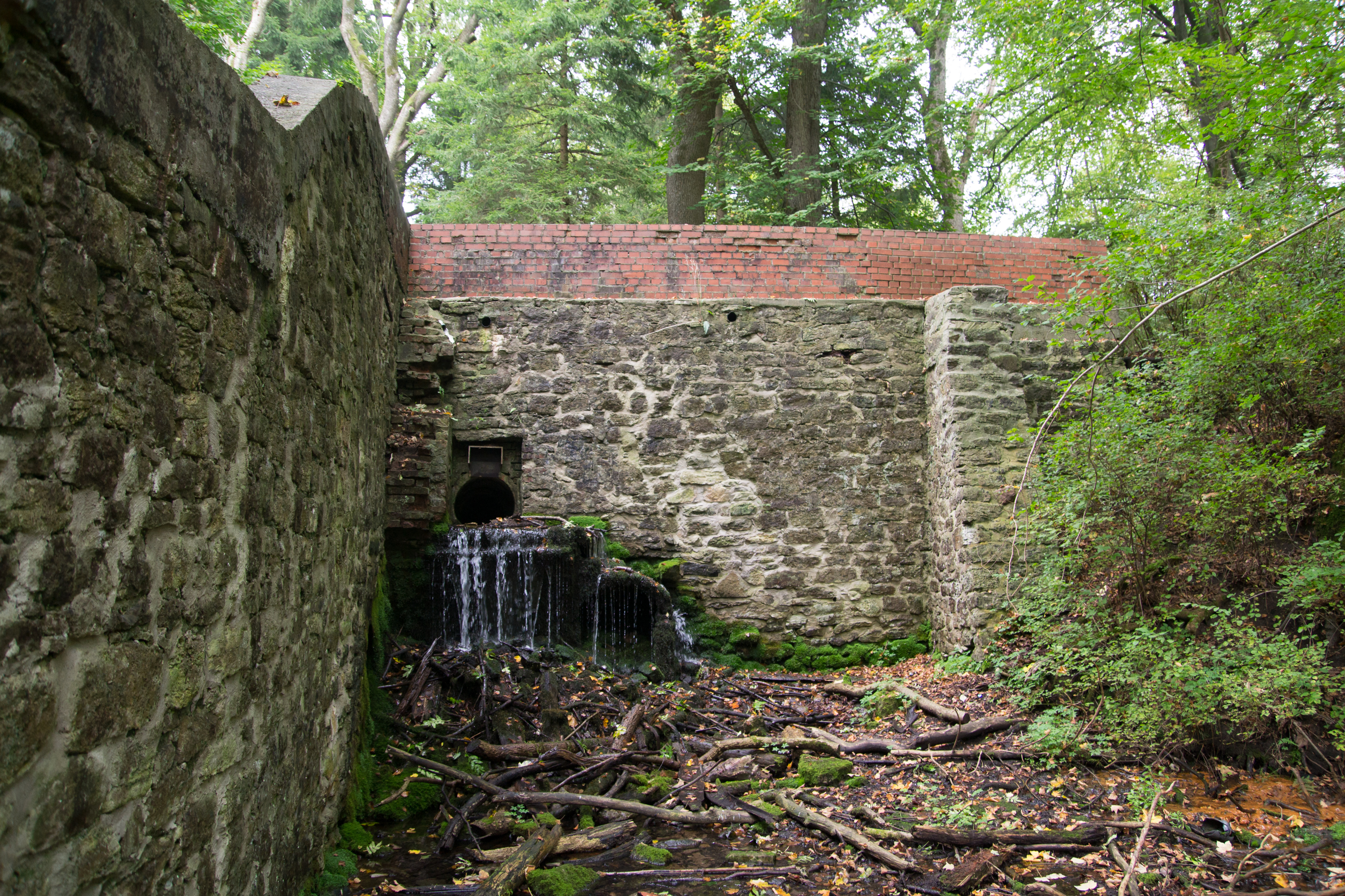 Naturschutzgebiet Schluchten und Moore am oberen Furlbach (Augustdorfer Teil); ehemalige Tütgemühle, erbaut 1849; als Mühle genutzt bis 1925, ab 1951 als Landschulheim genutzt, 1978 abgebrochen